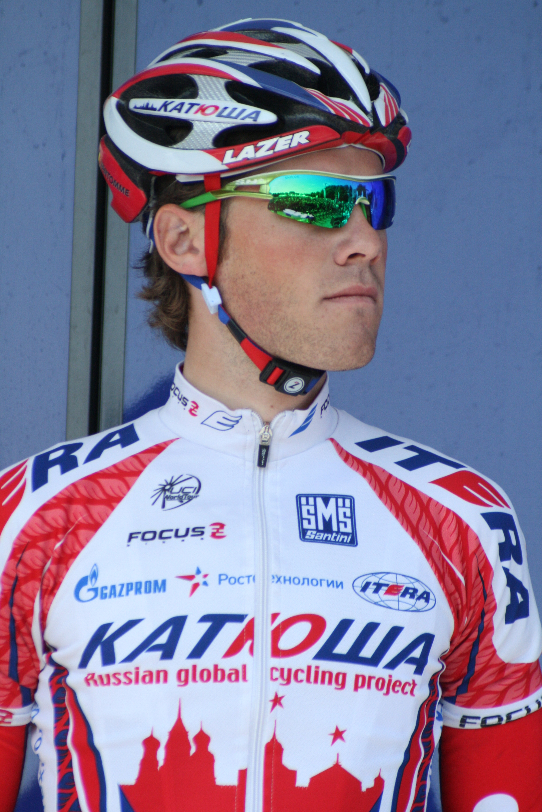 Présentation des coureurs au départ de la première étape Maxime Vantomme